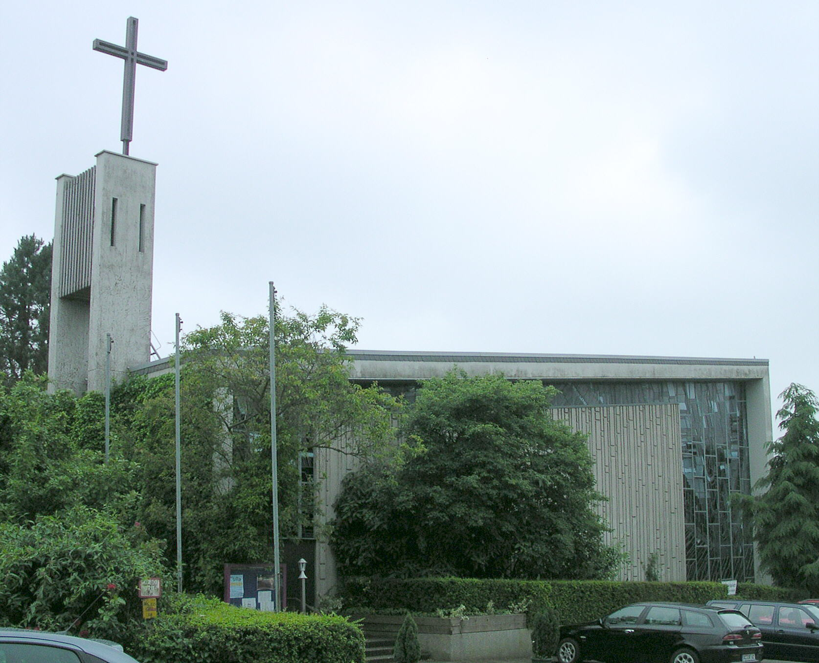 Aachen, evangelische Christuskirche Auf der Hüls